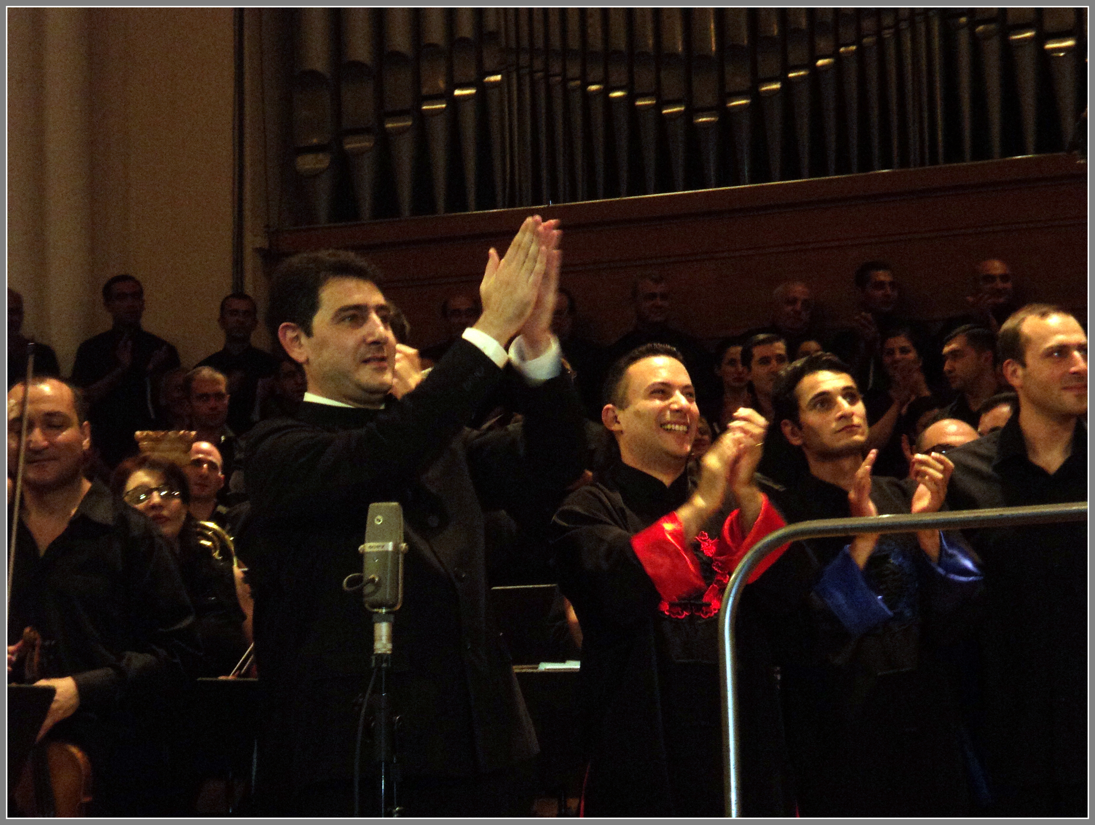 Էդուարդ Թոփչյան, «Տուրանդոտ» օպերա